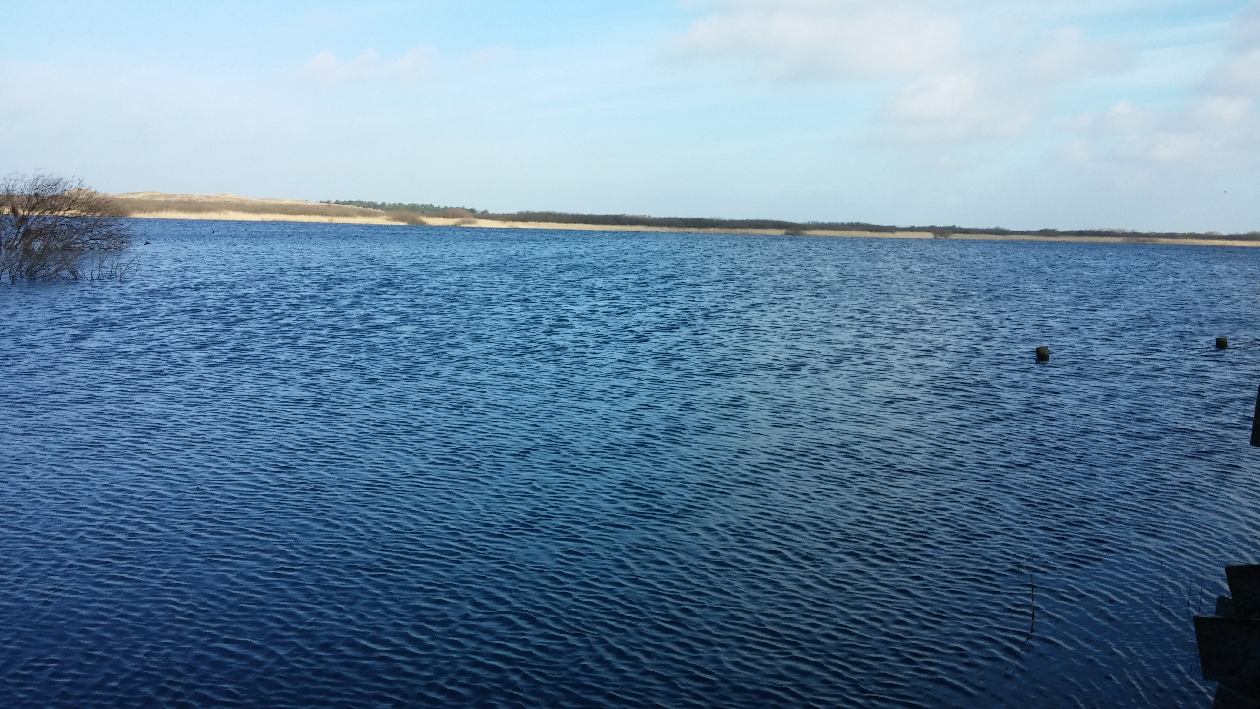 Het Zwanenmeer (Noord-Holland).